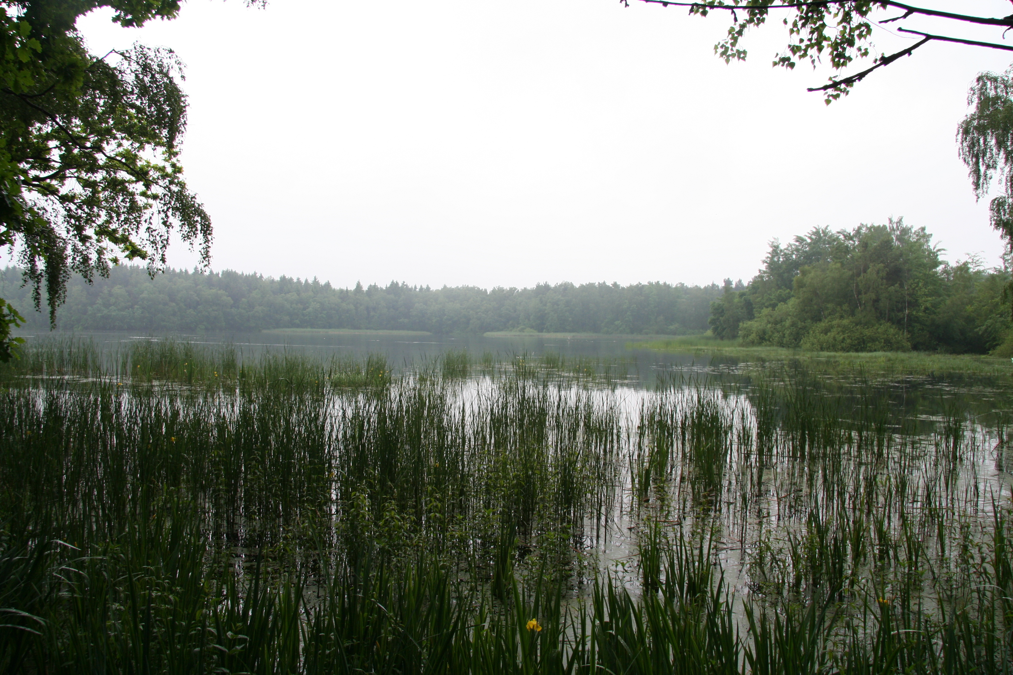 Der Filzteich bei Niedercrinitz innerhalb des FFH-Gebietes "Crinitzer Wasser und Teiche im Kirchberger Granitgebiet"